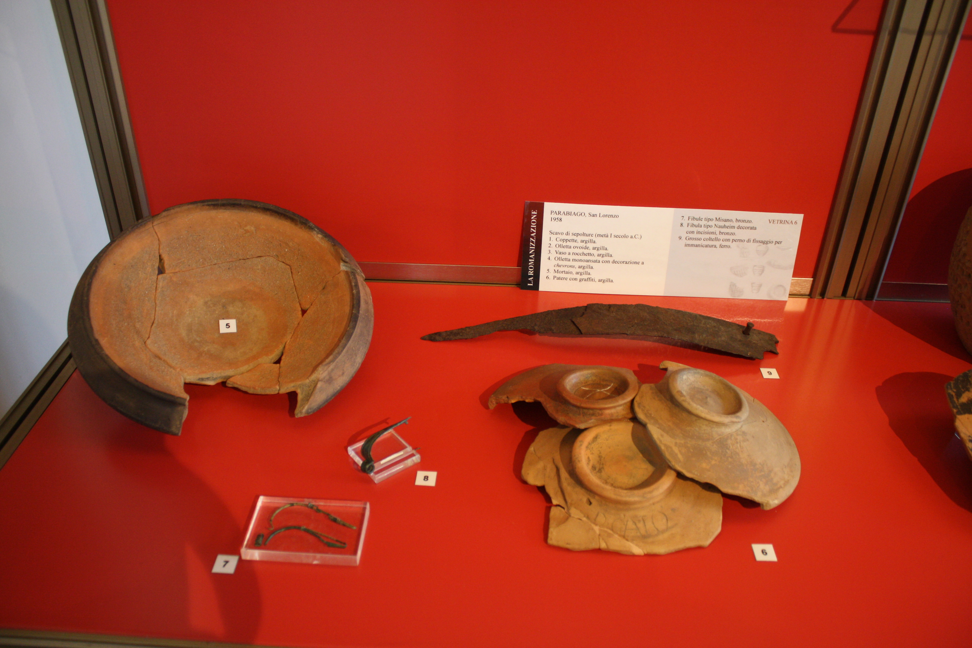 Ritrovamenti d'età romana (metà I sec. a.C) rinvenuti a Parabiago, località San Lorenzo, nel 1958. In ordine numerico, mortaio d'argilla, patere d'argilla con graffiti, fibule tipo Misano in bronzo, fibula tipo Nauheim in bronzo decorata con incisioni e grosso coltello in ferro con perno di fissaggio per immanicatura.